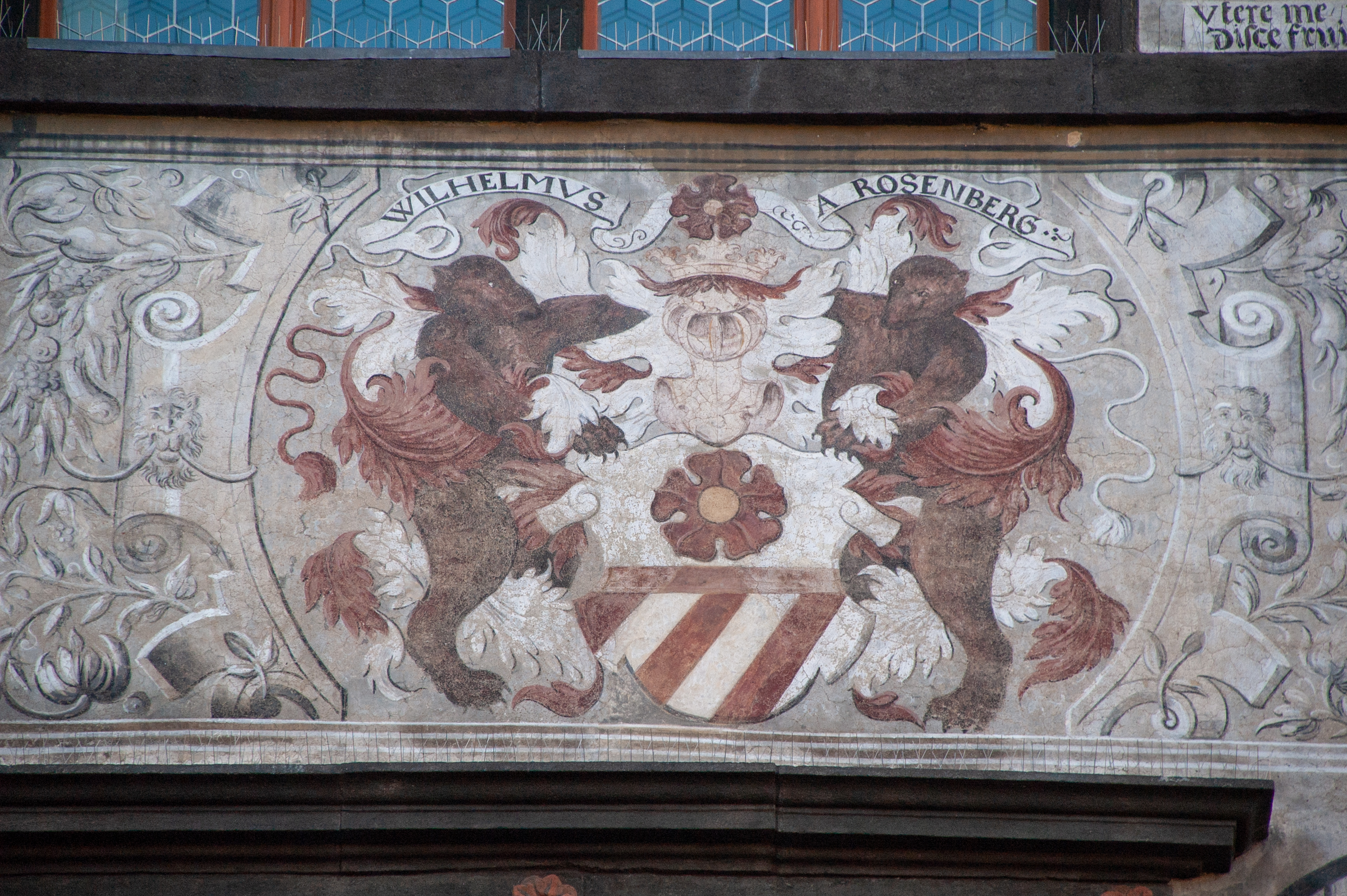 Budova staré radnice v Prachaticích – detaily